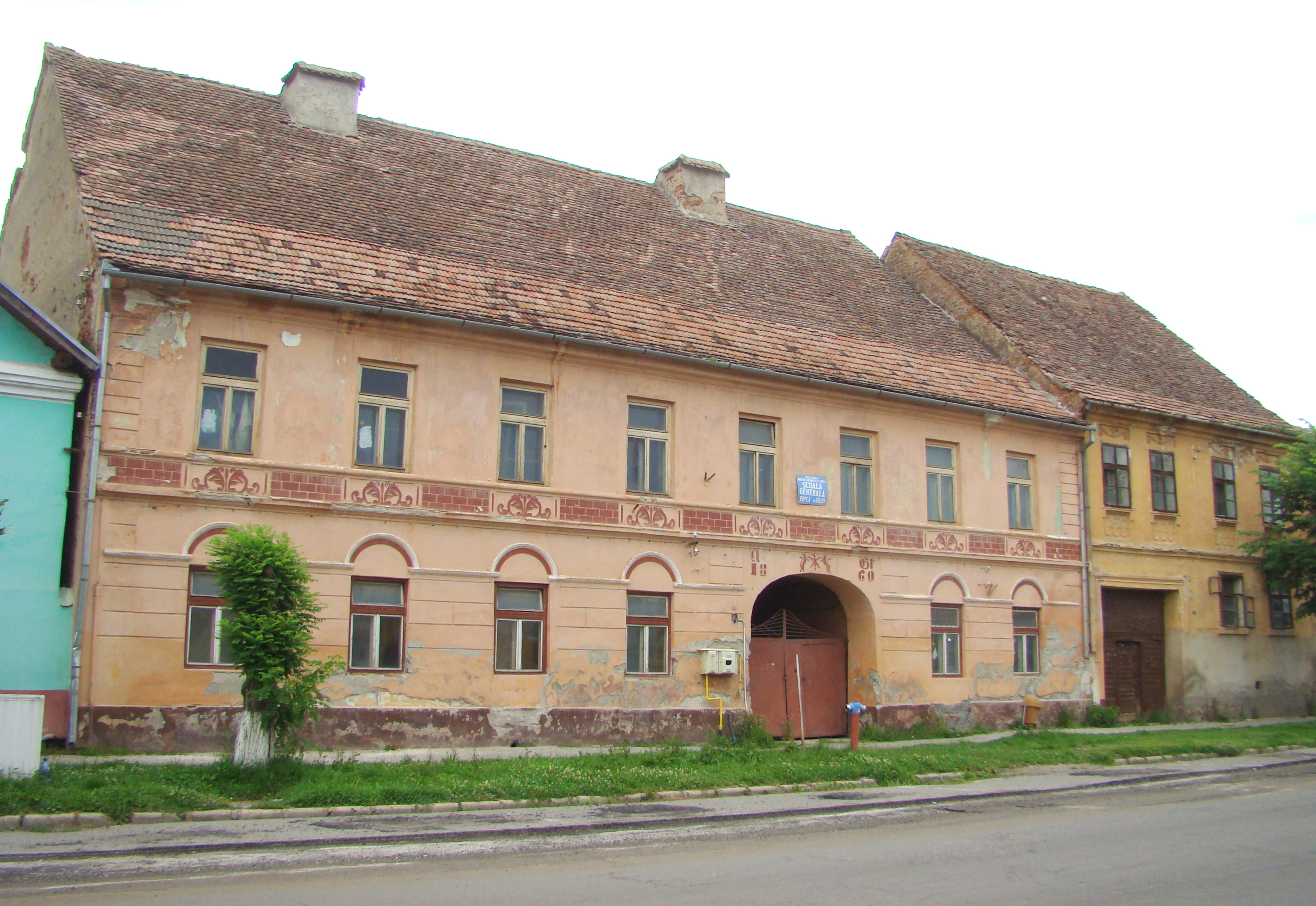 Casă, oraș Rupea, str. Republicii 117 1860